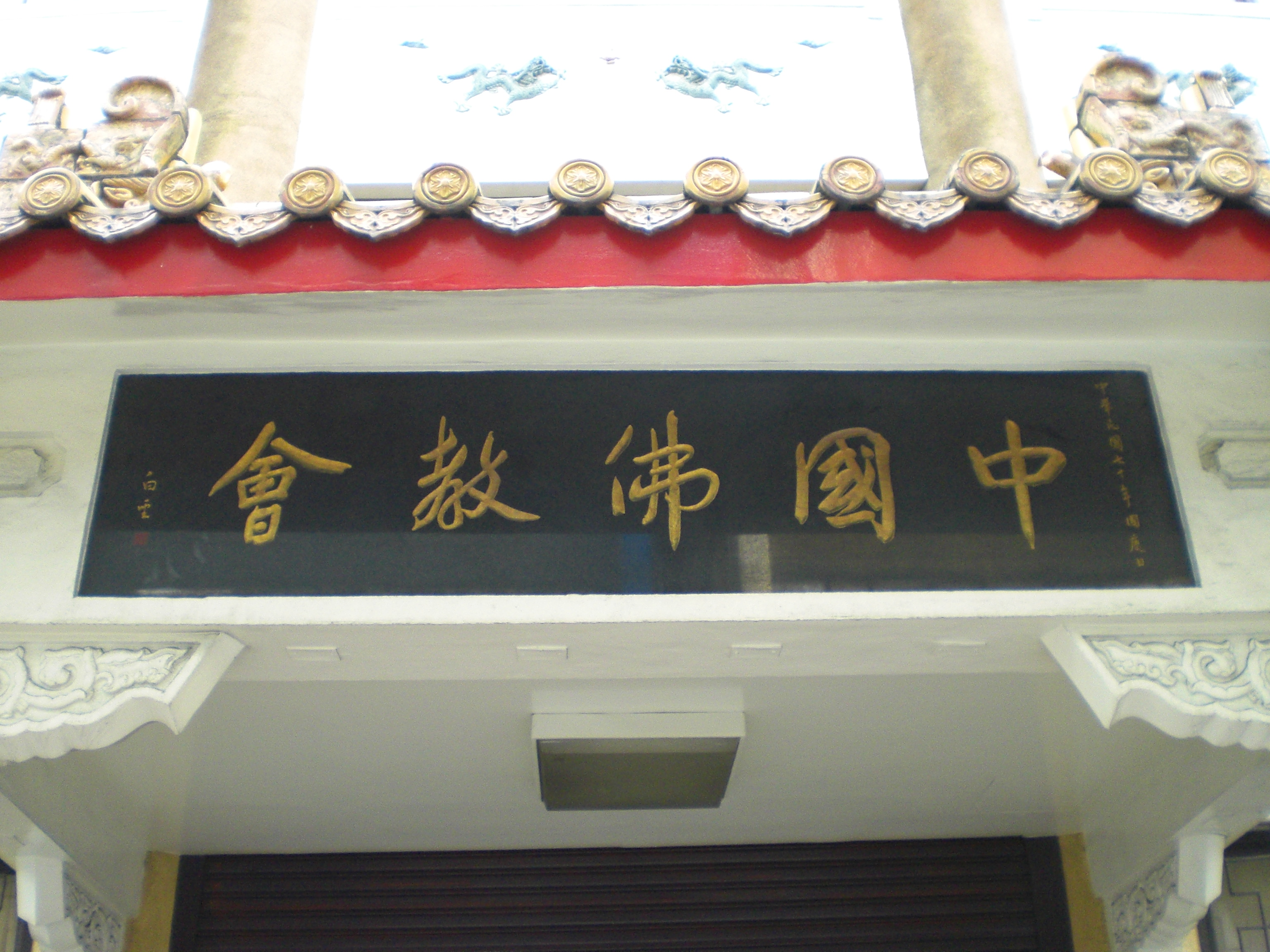 位於台灣台北市中正區紹興北街6號的中國佛教會總會大門匾額，釋白聖題字。